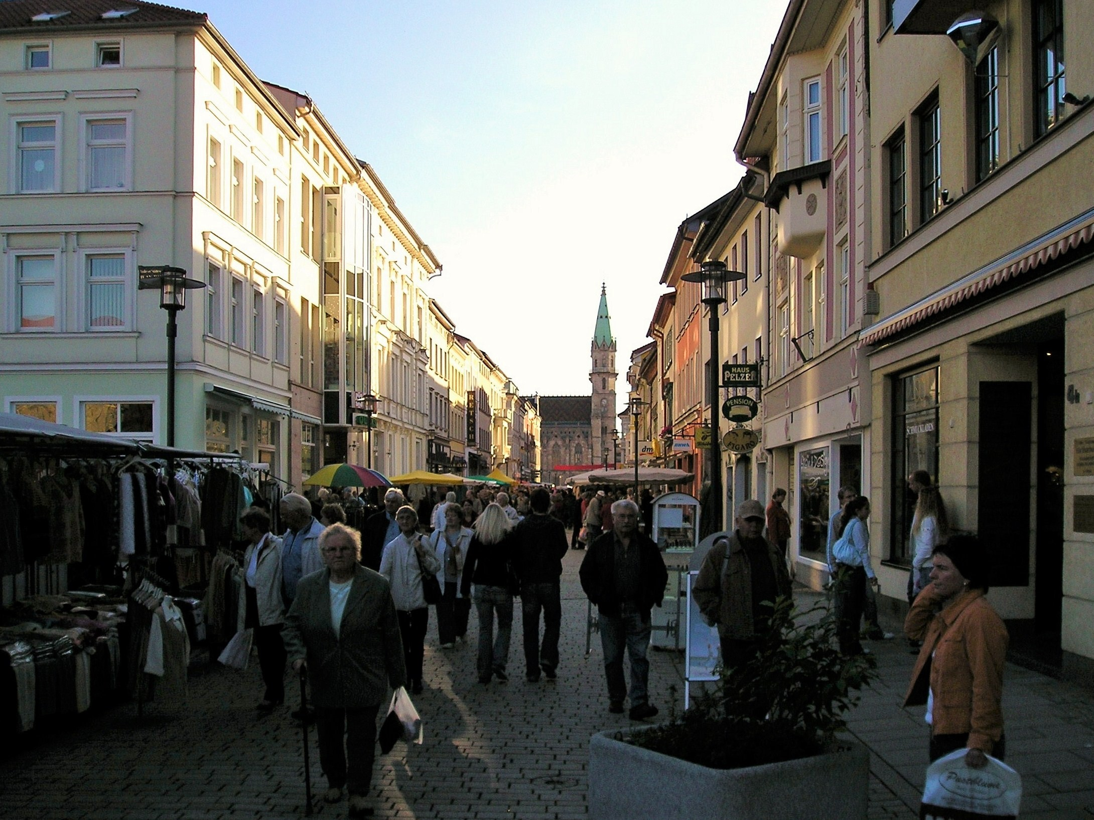 Georgstraße, die Haupteinkaufsstraße in Meiningen, hier am verkaufsoffenen Sonntag "Meininger Herbst".